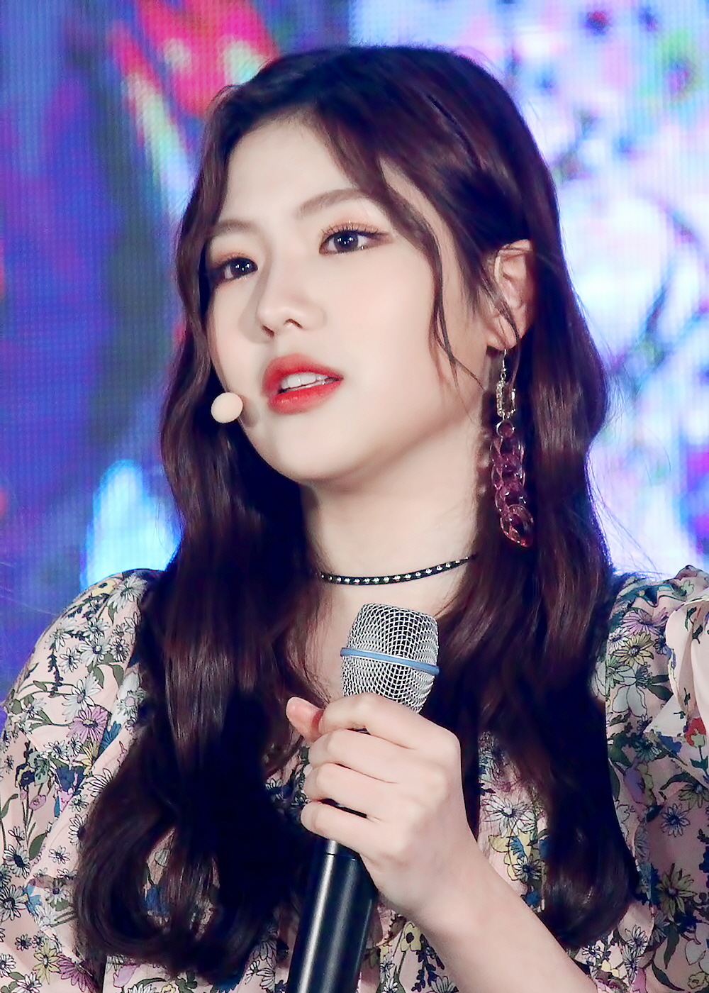 170526 안산 근로자 뮤직페스티벌 구구단 직찍